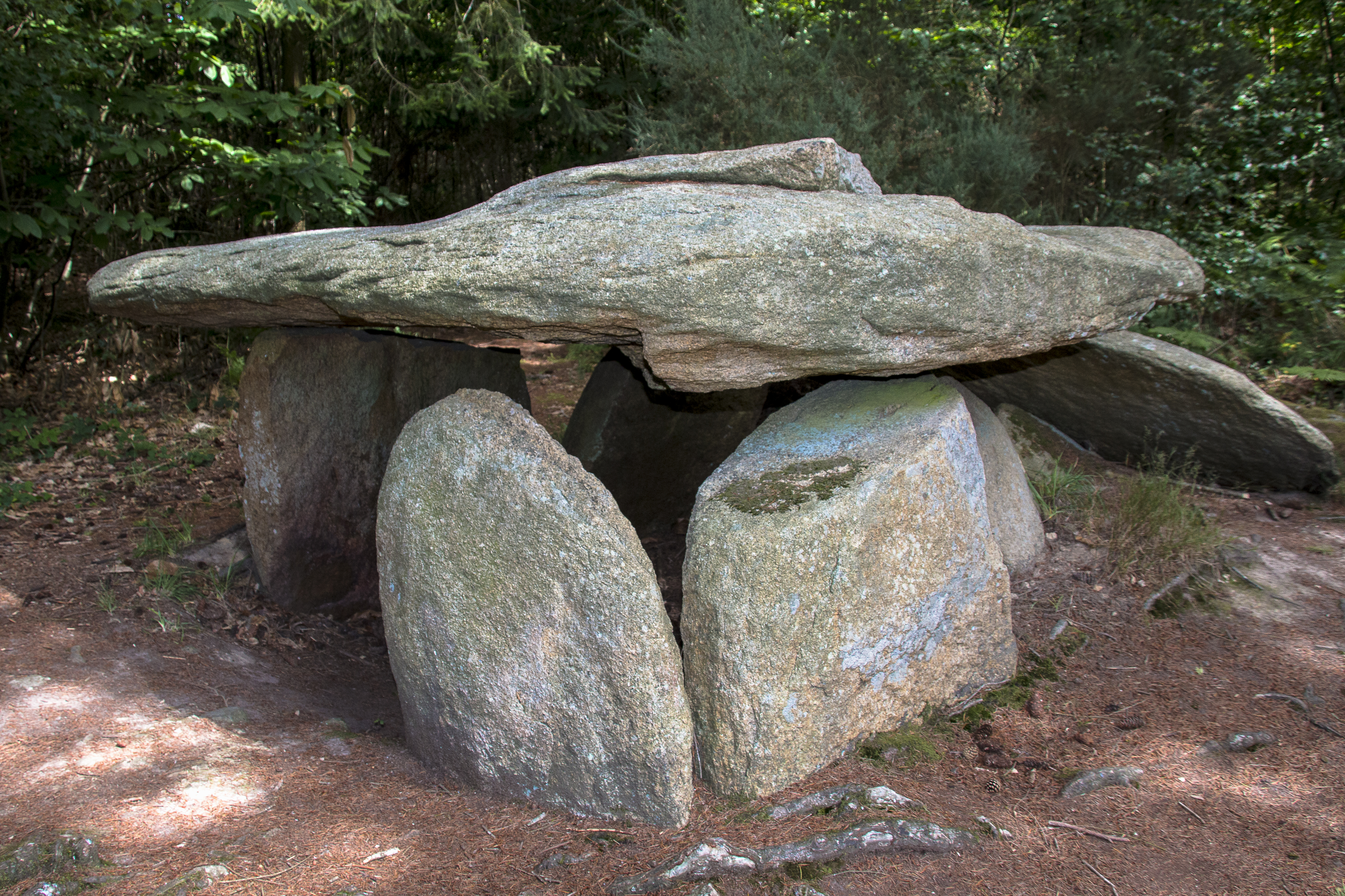 Dolmen des Follets (Saint-Gravé)